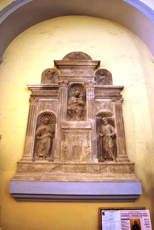 Chiesa di San Francesco d'Assisi ad Alcamo - Interni